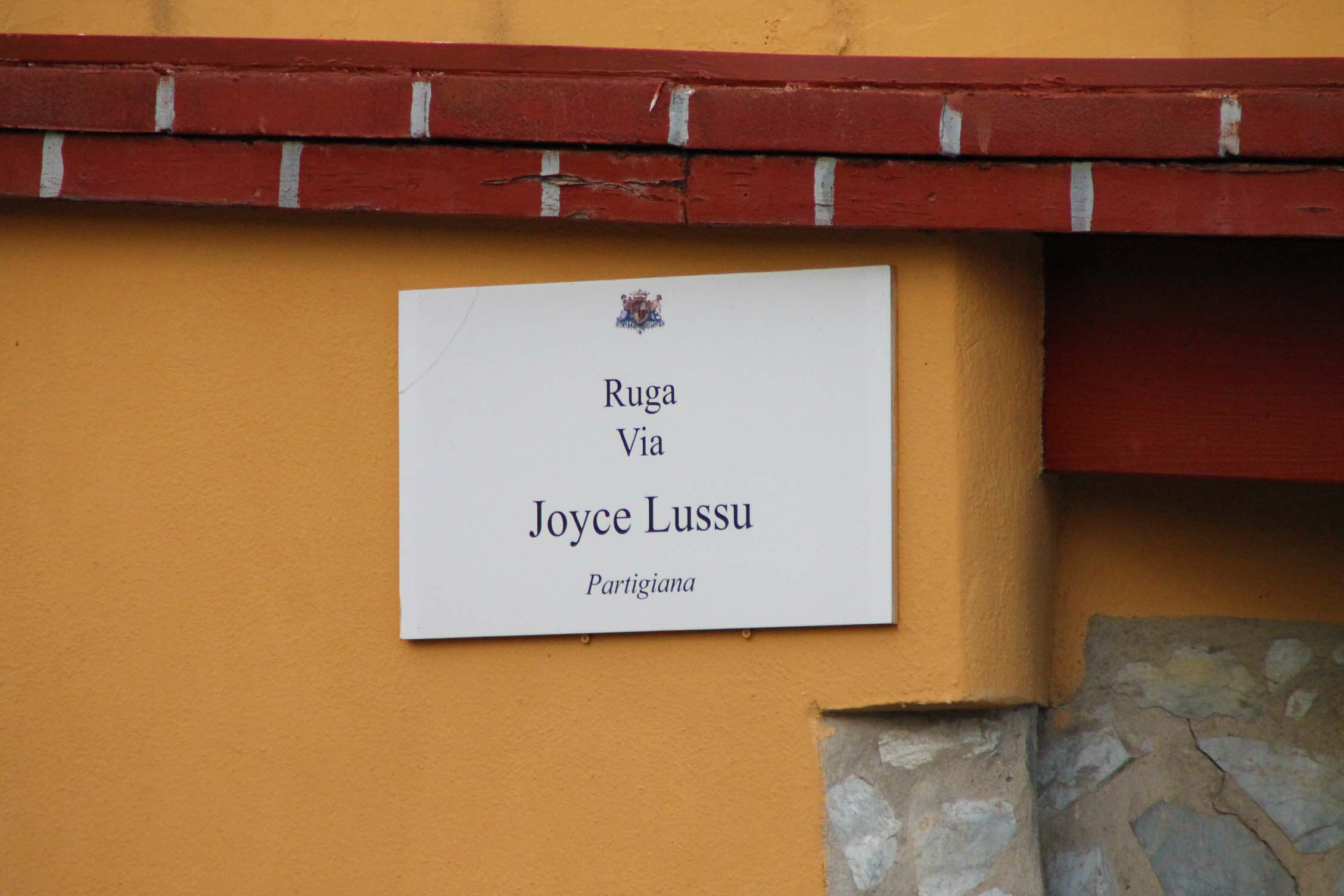 Inaugurazione del Comune di Cagliari della targa "Joyce Lussu" al Villaggio dei pescatori, "Omaggio a Joyce Lussu, Rosa Luxemburg, Maria Piera Mossa attraverso la toponomastica femminile"